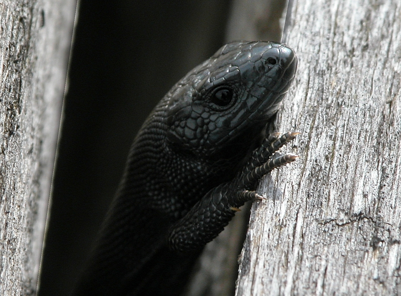 Zootoca vivipara (melanic), Waldeidechse, Feldberg, Taunus, Hessen, Deutschland, Germany